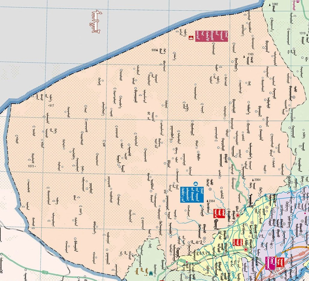 Монгол: Урадын хойд хошуу